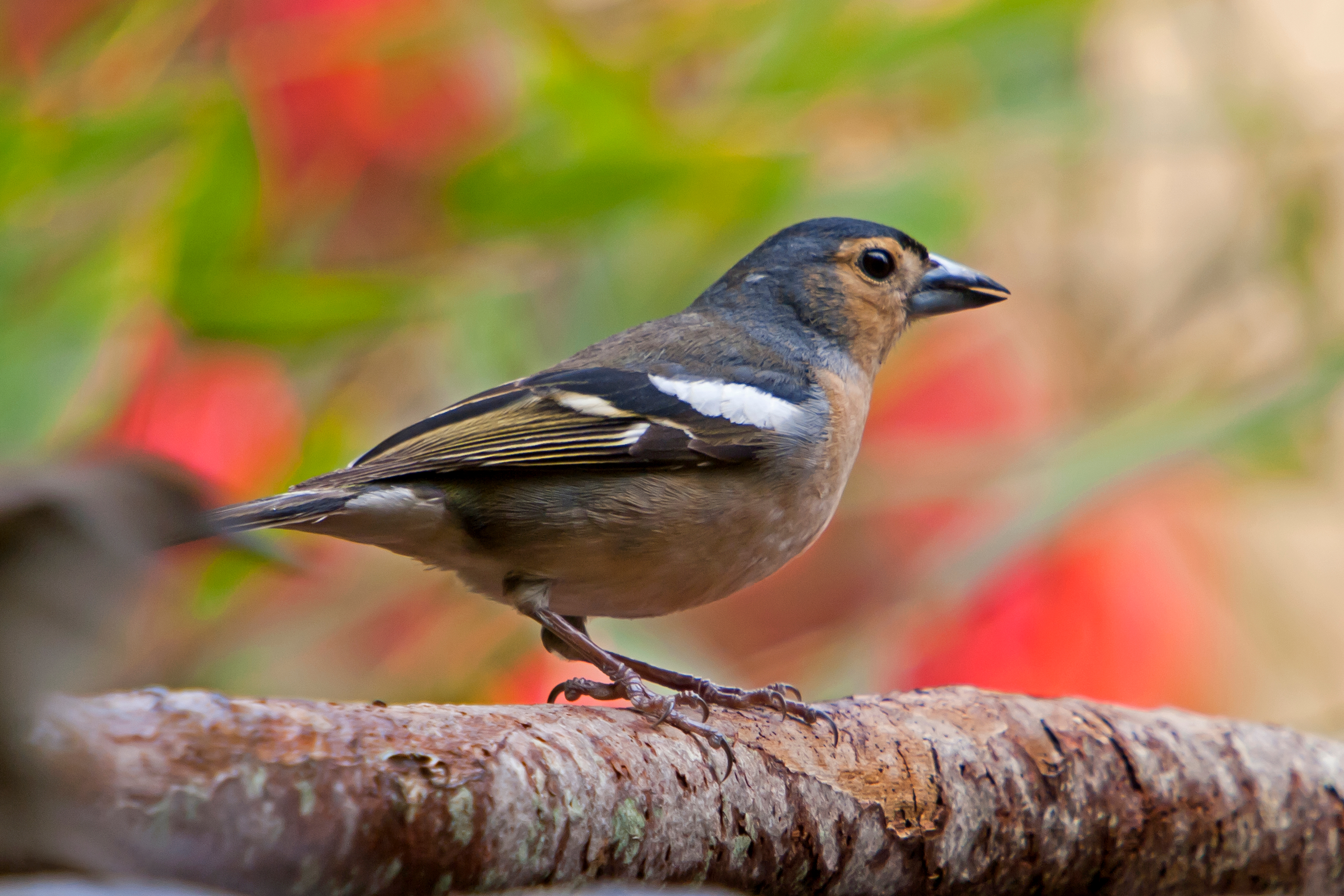 Pinzón Vulgar Fringilla coelebs canariensis (♂), Gran Canaria.